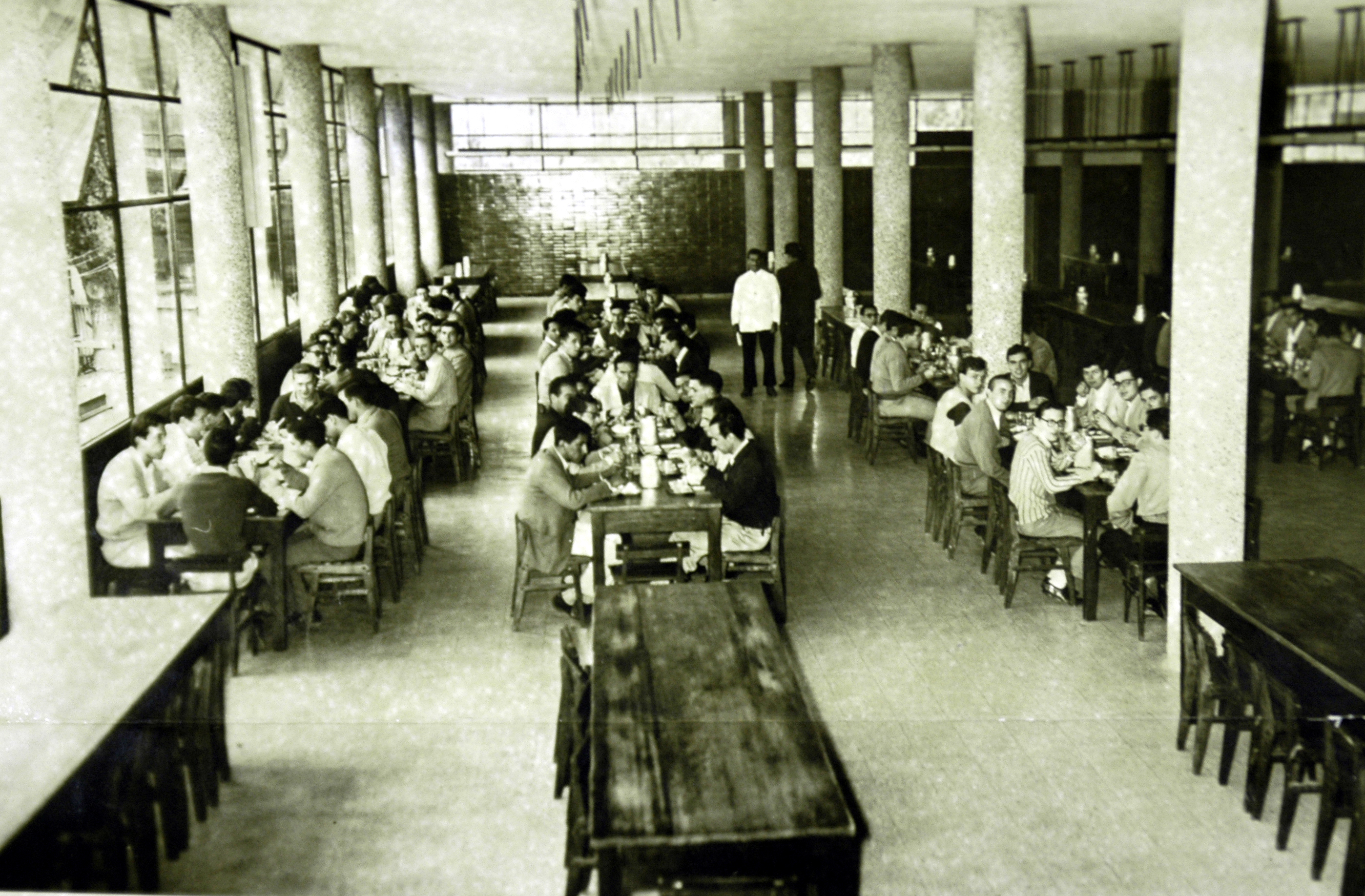 Interior del Comedor de la Universidad Nacional de La Plata, inaugurado en 1961. Actual edificio de la Facultad de Odontología.